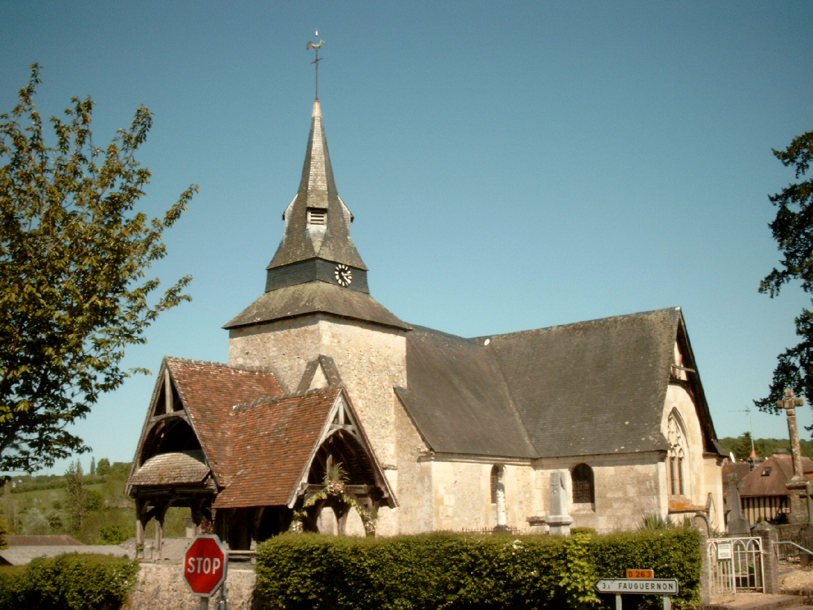 JazZz99